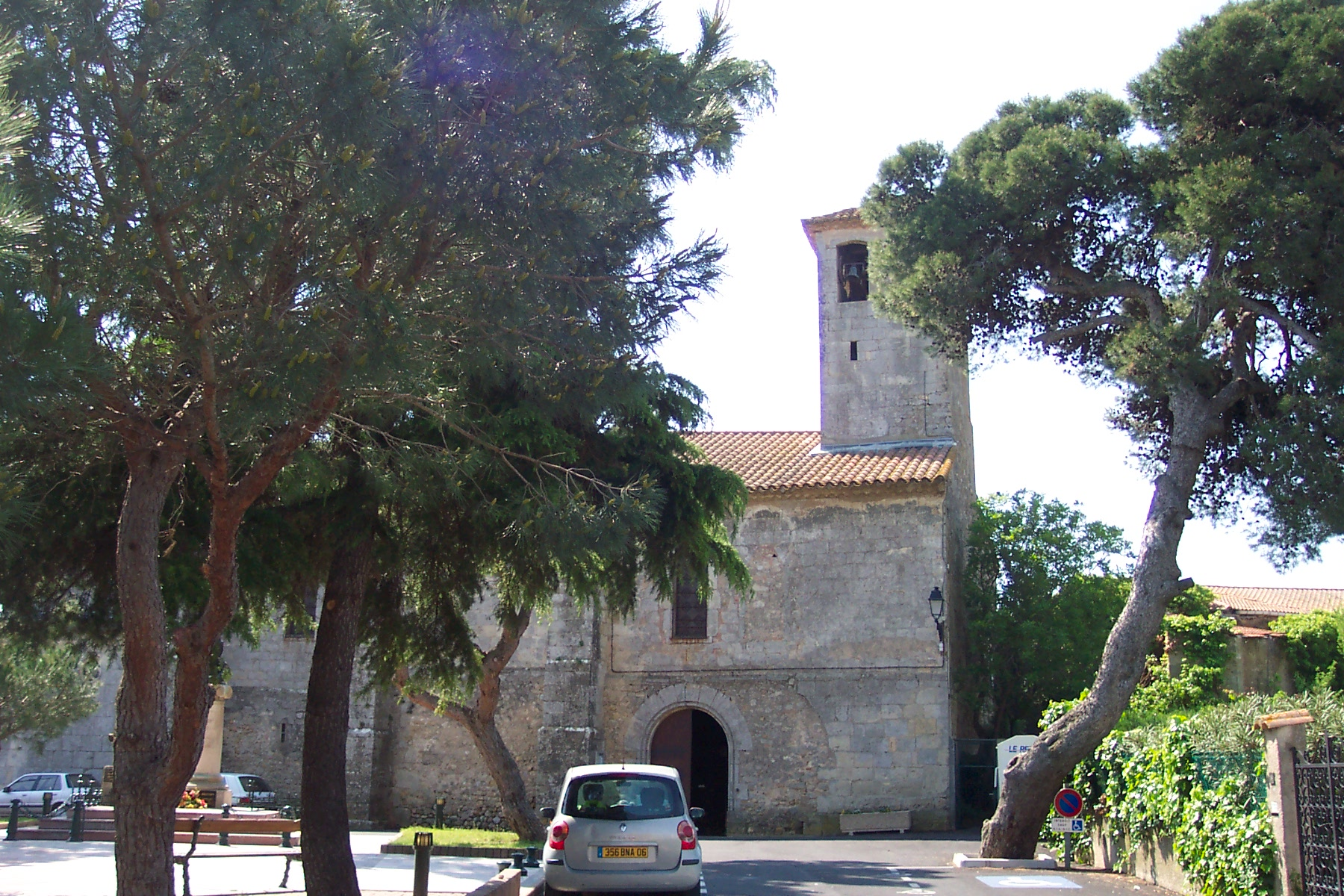 Vue générale de l'église